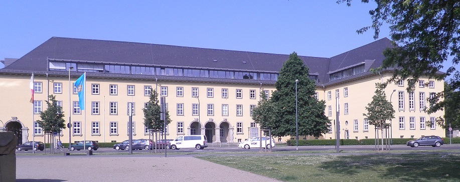 Das Amtsgerichtsgebäude an der August-Klotz-Straße 14 in Düren.